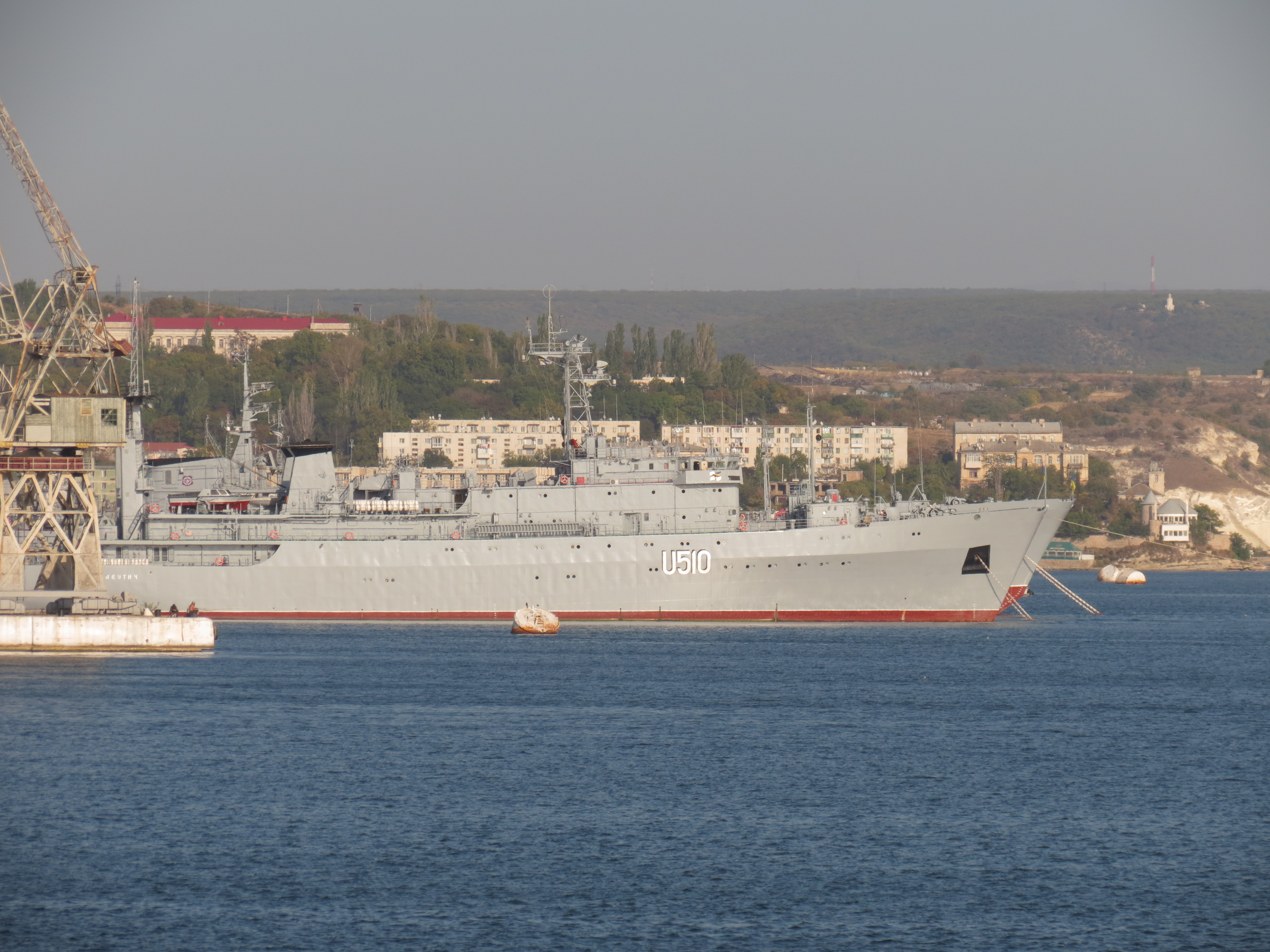 Корабль управления Славутич. Севастополь, Украина